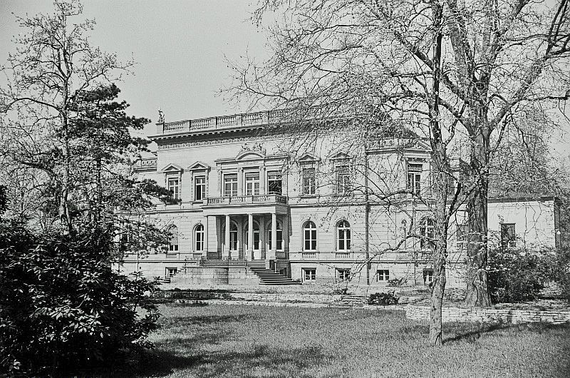 Original image description from the Deutsche Fotothek Außenansicht des Klinikums